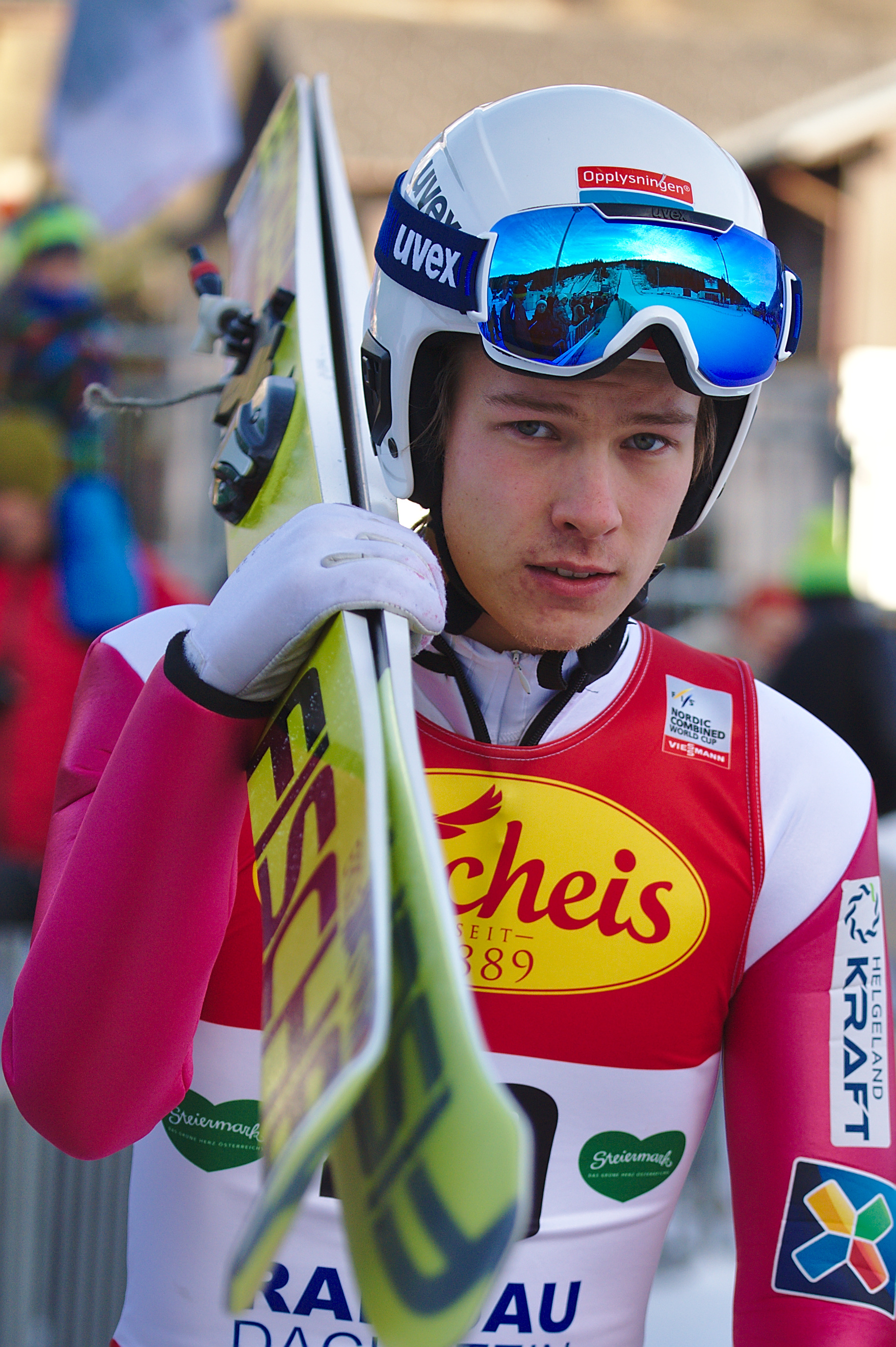 FIS Worldcup Nordic Combined Ramsau 2016. Bild zeigt Espen Andersen (NOR)